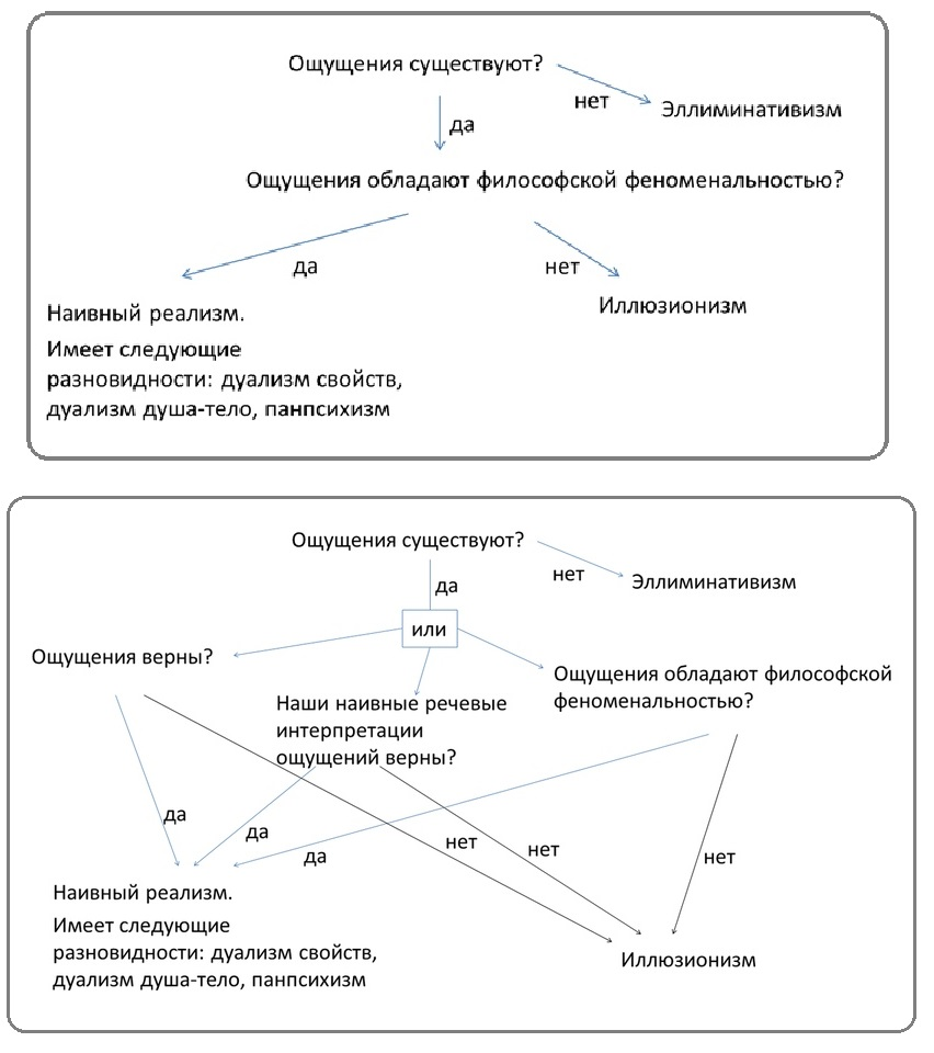 Соотношение философских взглядов на сознание и свойства ощущений На основе Frankish K. Illusionism: as a theory of consciousness. – Andrews UK Limited, 2017 и Blackmore S. J. Conversations on consciousness. – Oxford University Press, 2006.